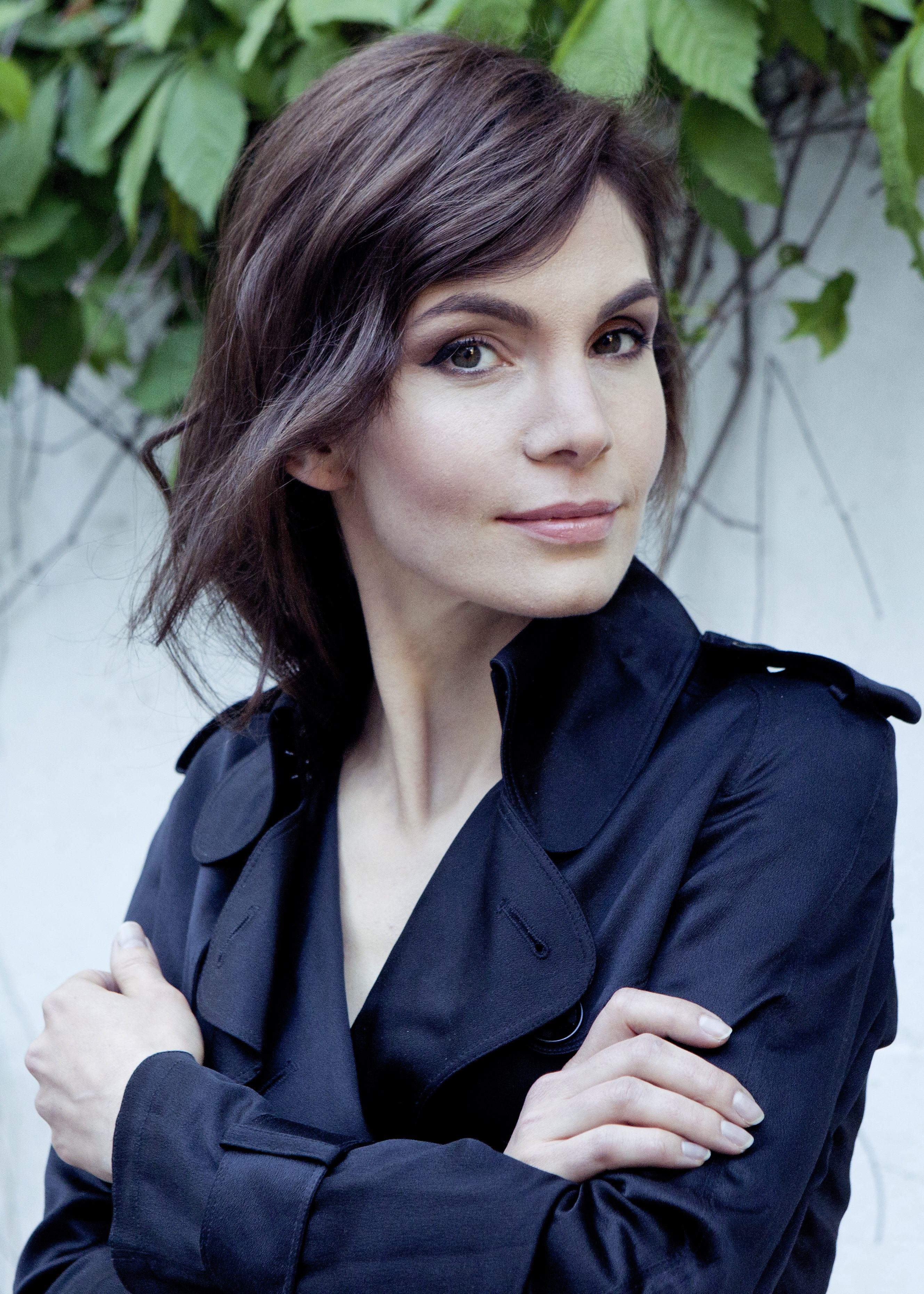 Nadine Warmuth in München